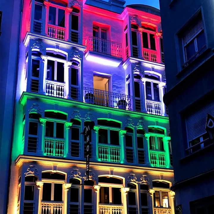 Bandera riojana en edificio de Logroño durante las fiestas de San Mateo 2018